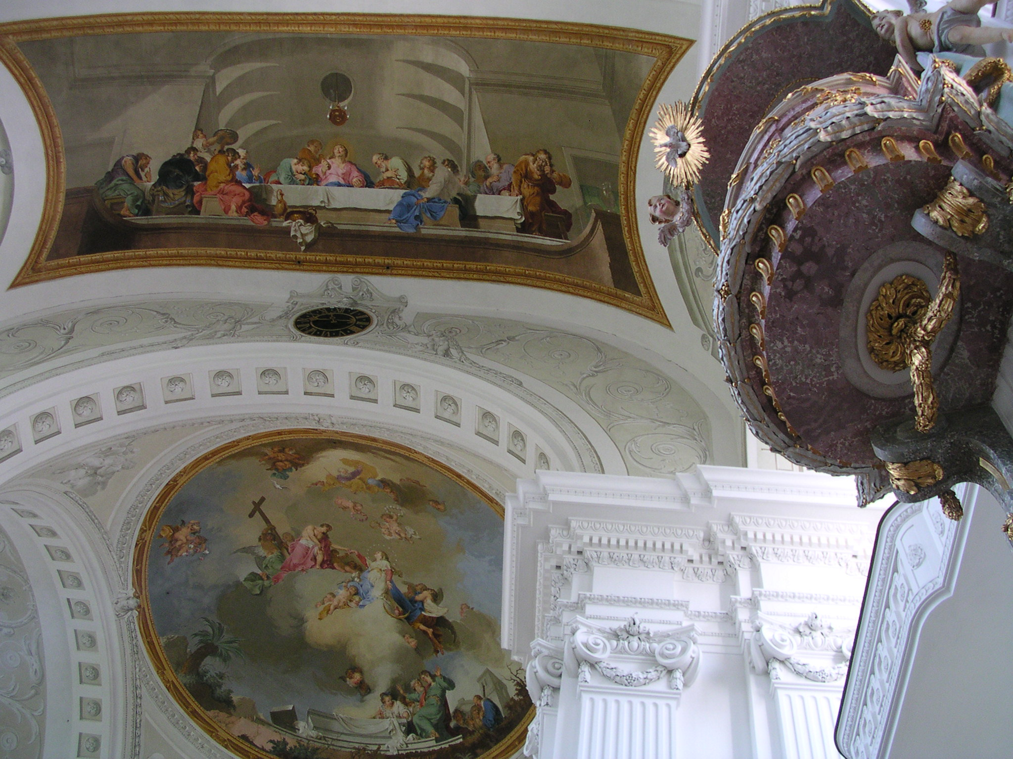 Das letzte Abendmahl, östliches Deckenfresko im Langhaus Himmelfahrt Mariens, Deckenfresko im Möchssaal, Januarus Zick 1784